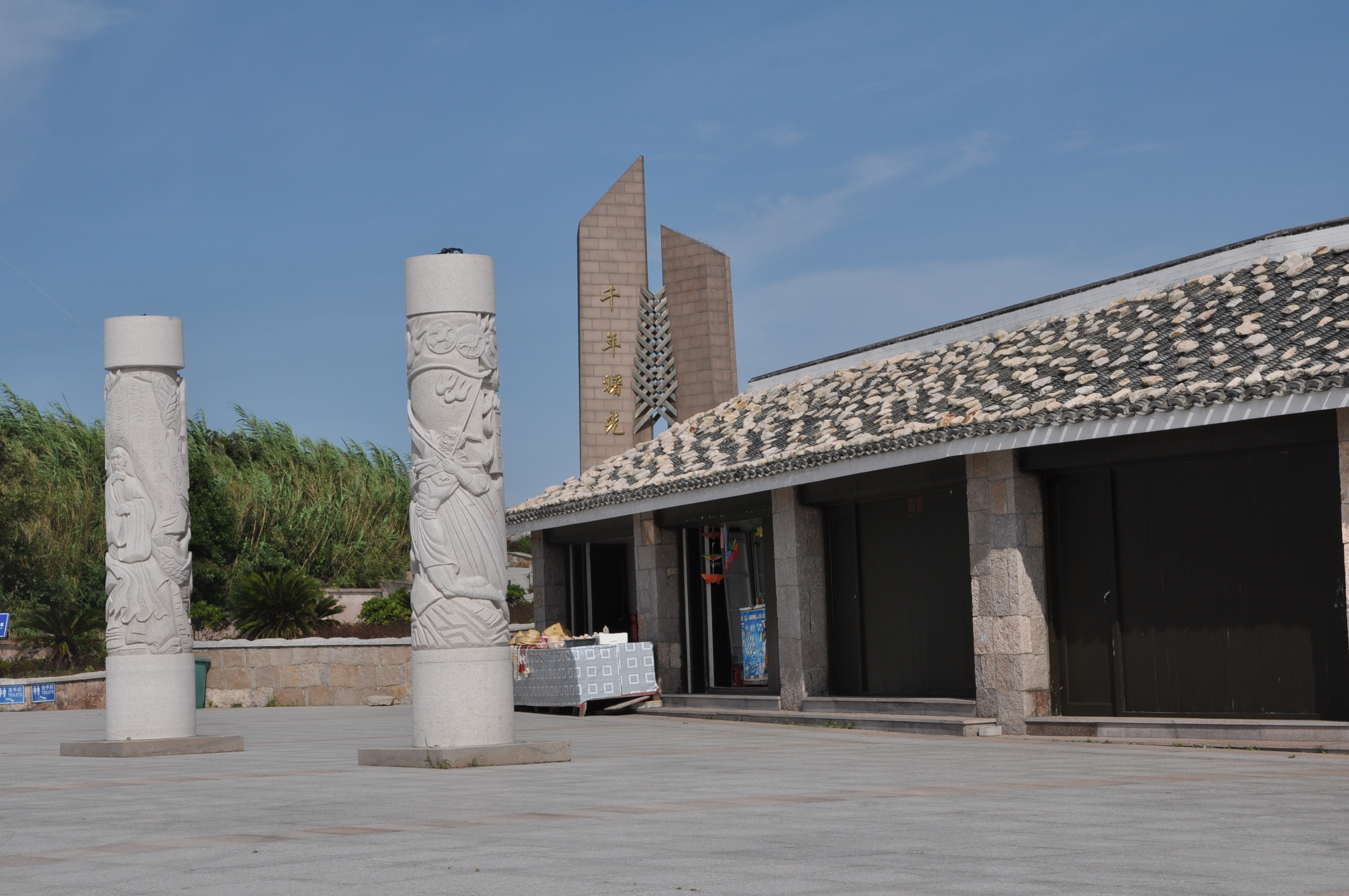 千年曙光园内